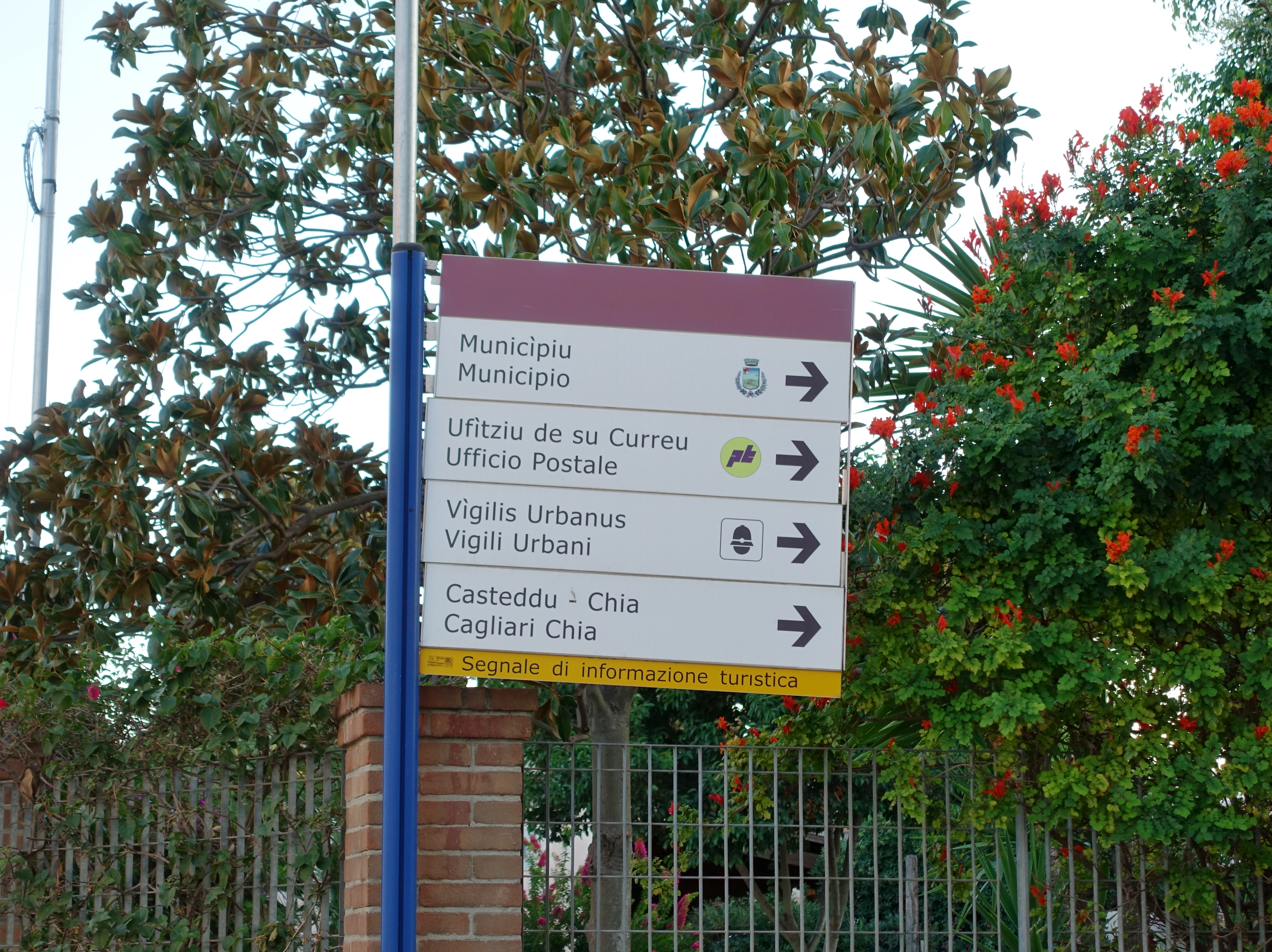 Zweisprachiges Hinweisschild (sardisch/italienisch) in der Stadt Pula im Süden von Sardinien, Italien